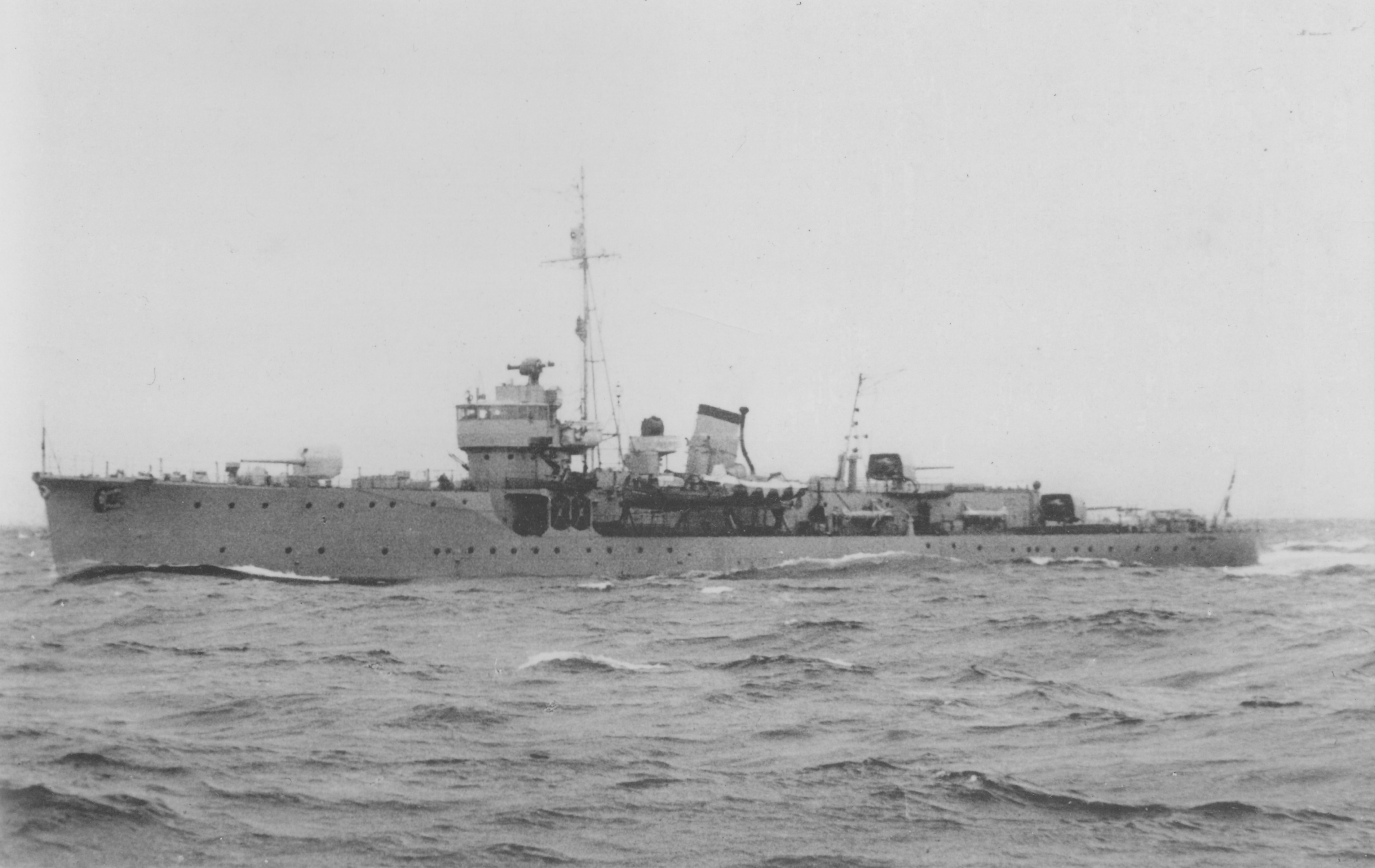 日本海軍 占守型海防艦「八丈」、佐世保沖